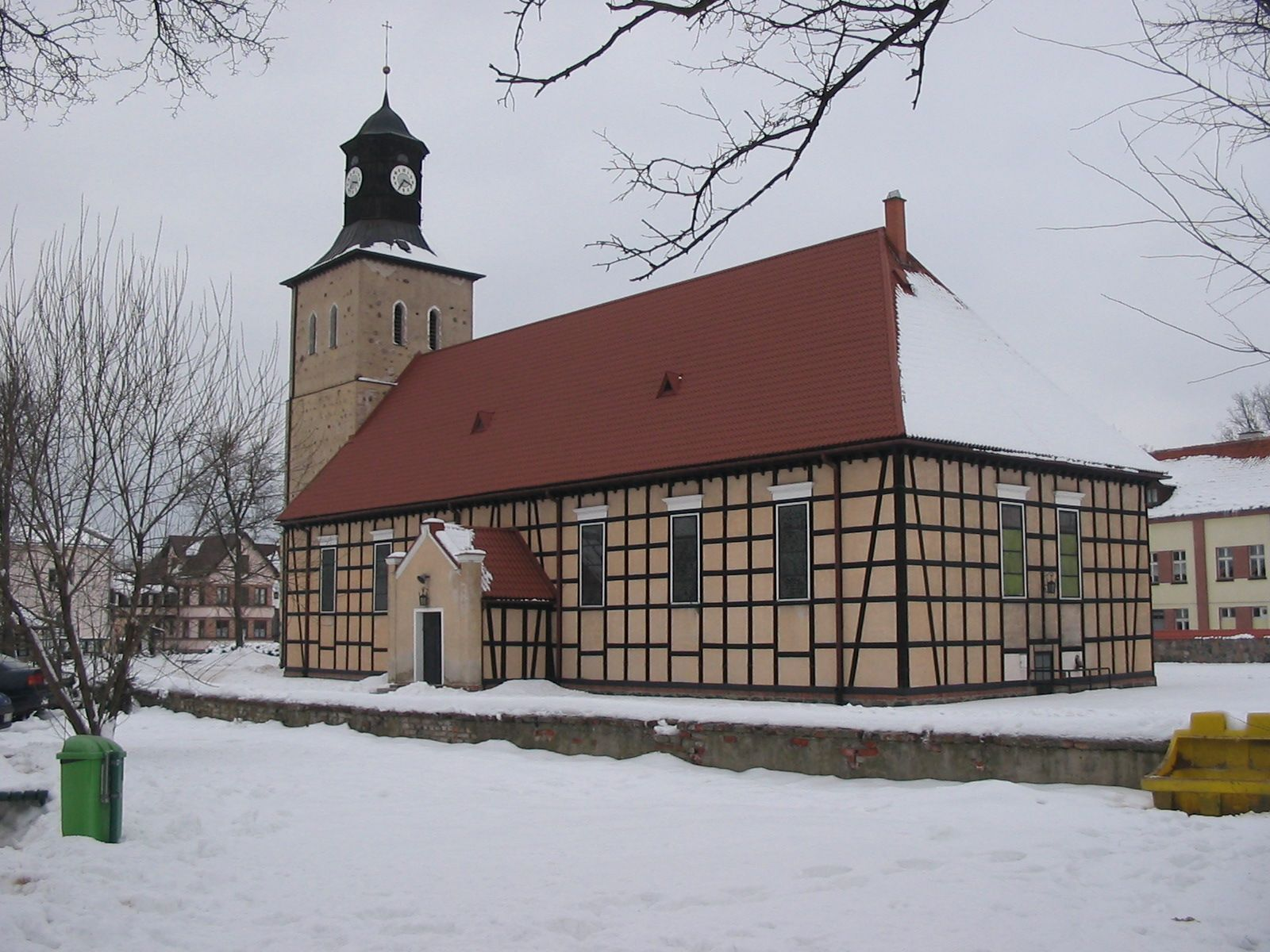 Kościół p.w. św. Jana Chrzciciela w Piszu (zabytek nr rejestr. A-472)